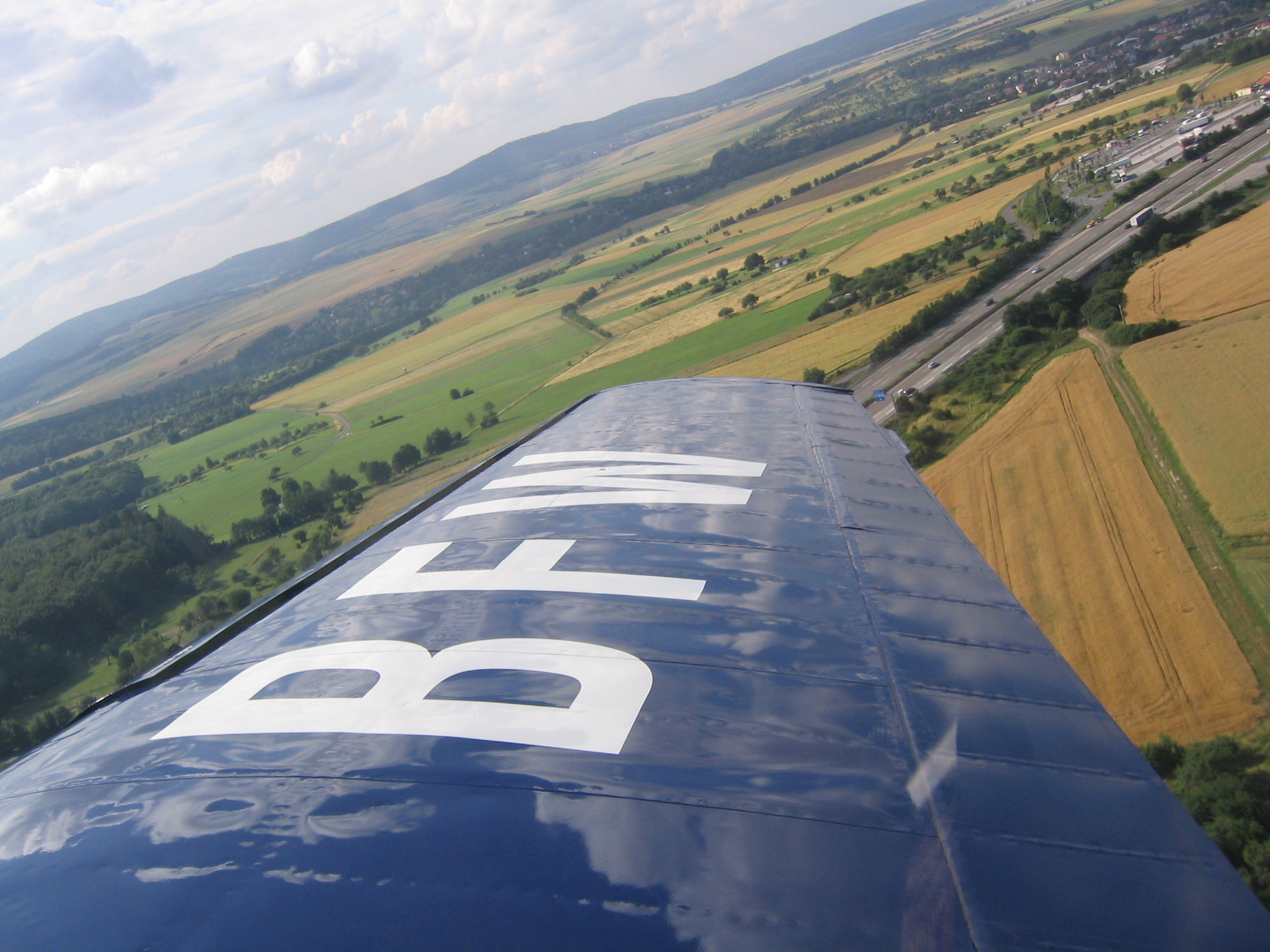 Foto während des Fluges nach rechts kurz nach start